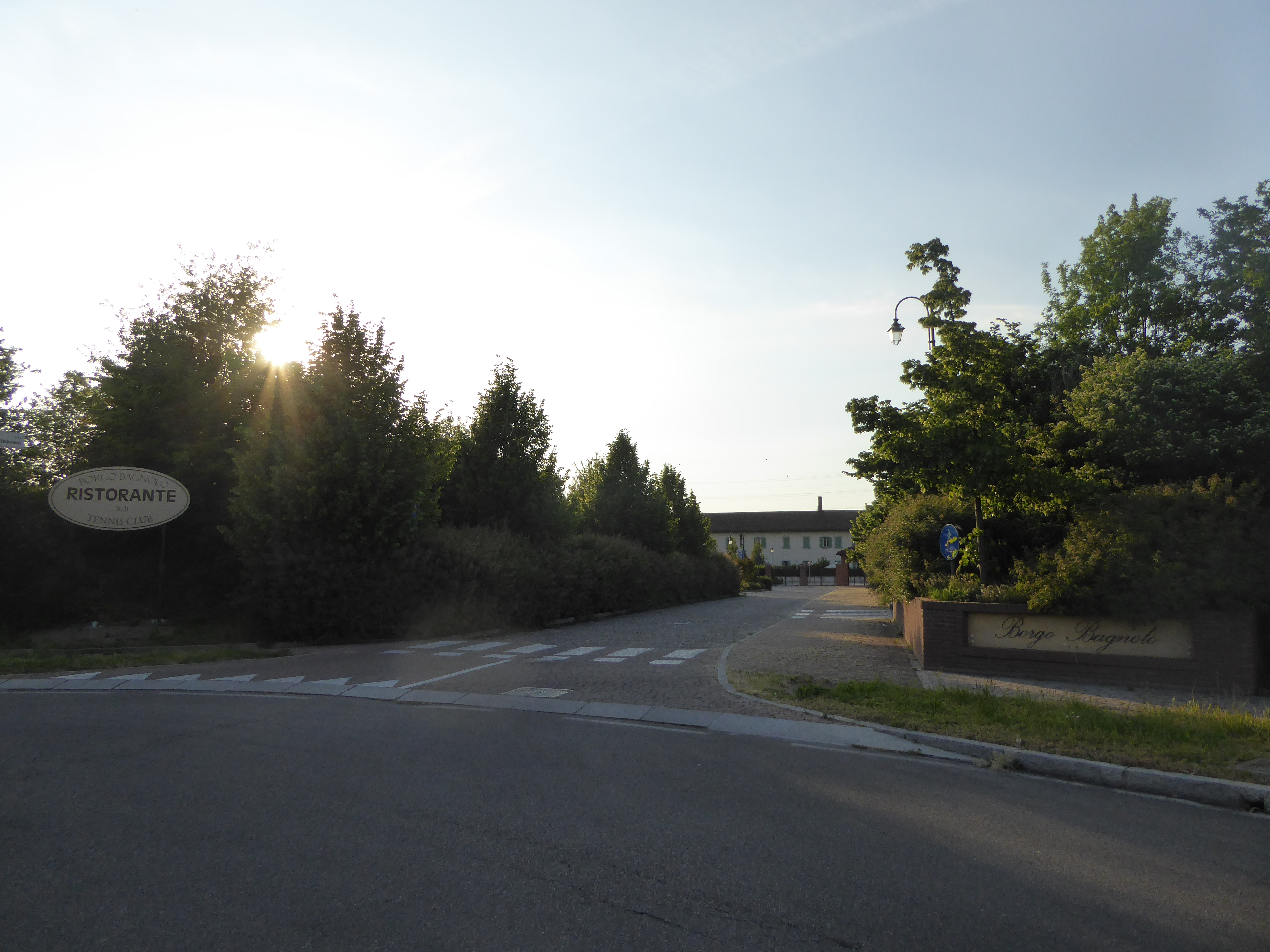 Borgo Bagnolo ingresso San Donato Milanese 2017